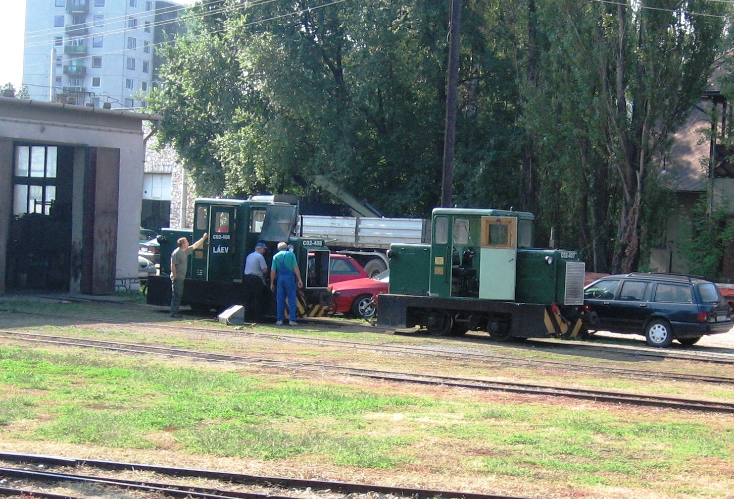 A LÁEV két C-50 típusú dízelmozdonya Majláthon a telephelyen még a Zöld Nyíl előtt.